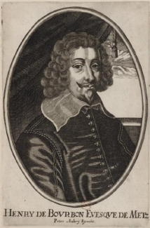 Henri-de-bourbon évêque de Metz et duc de Verneuil